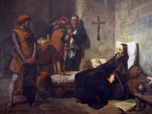 Giovanni Hus in carcere, olio su tela, 209 x 279 cm, Galleria d'arte moderna di Milano